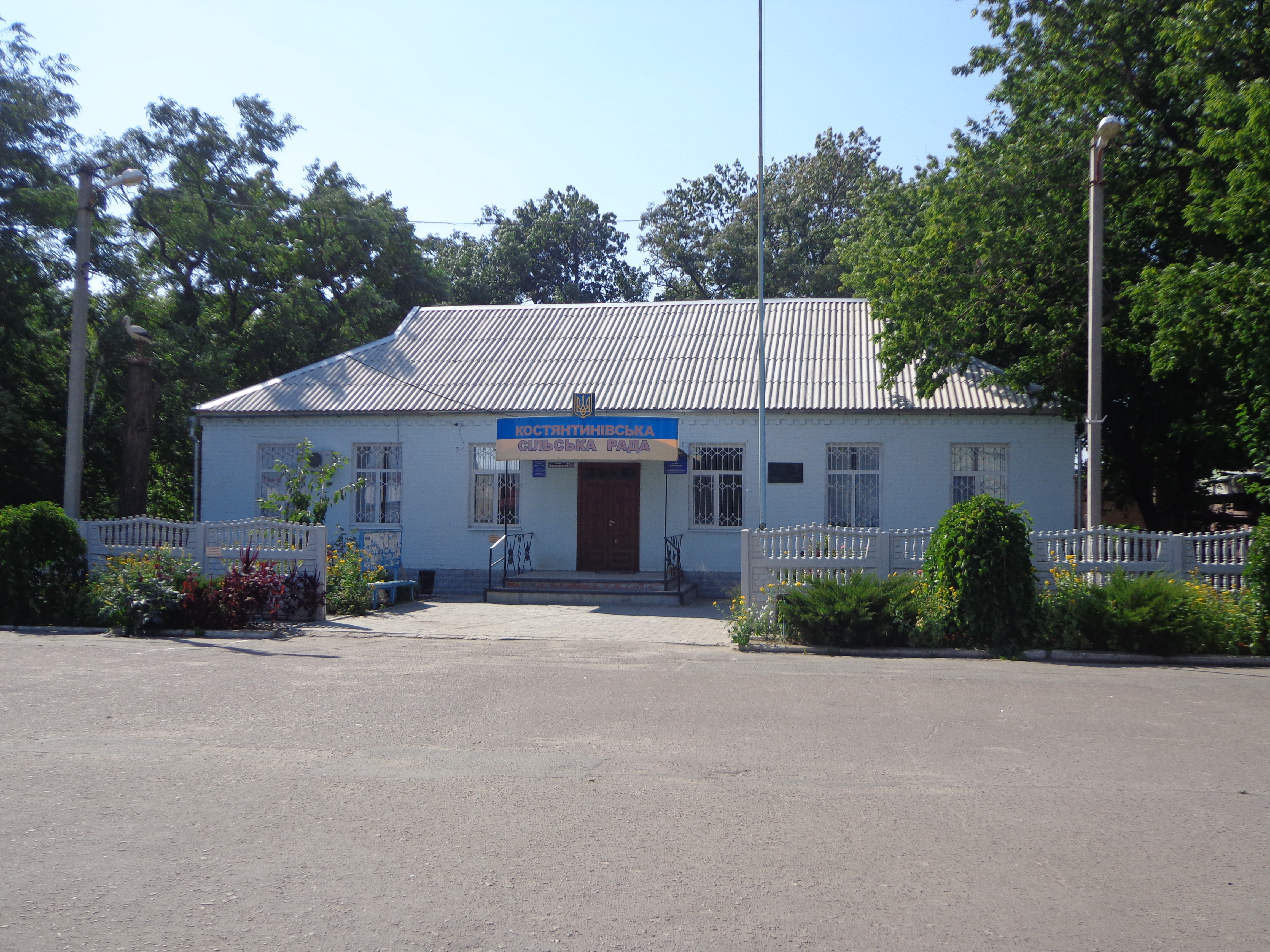 Сельский совет. Село Константиновка, Мелитопольский район, Запорожская область, Украина.